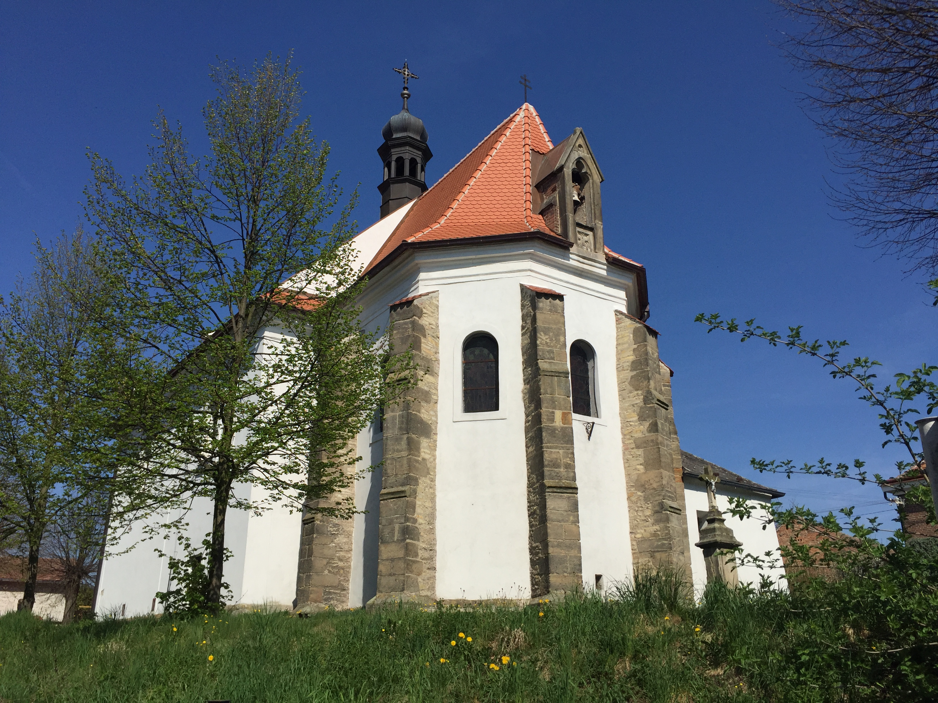 Kostel Nanebevzetí Panny Marie (Vejvanovice)